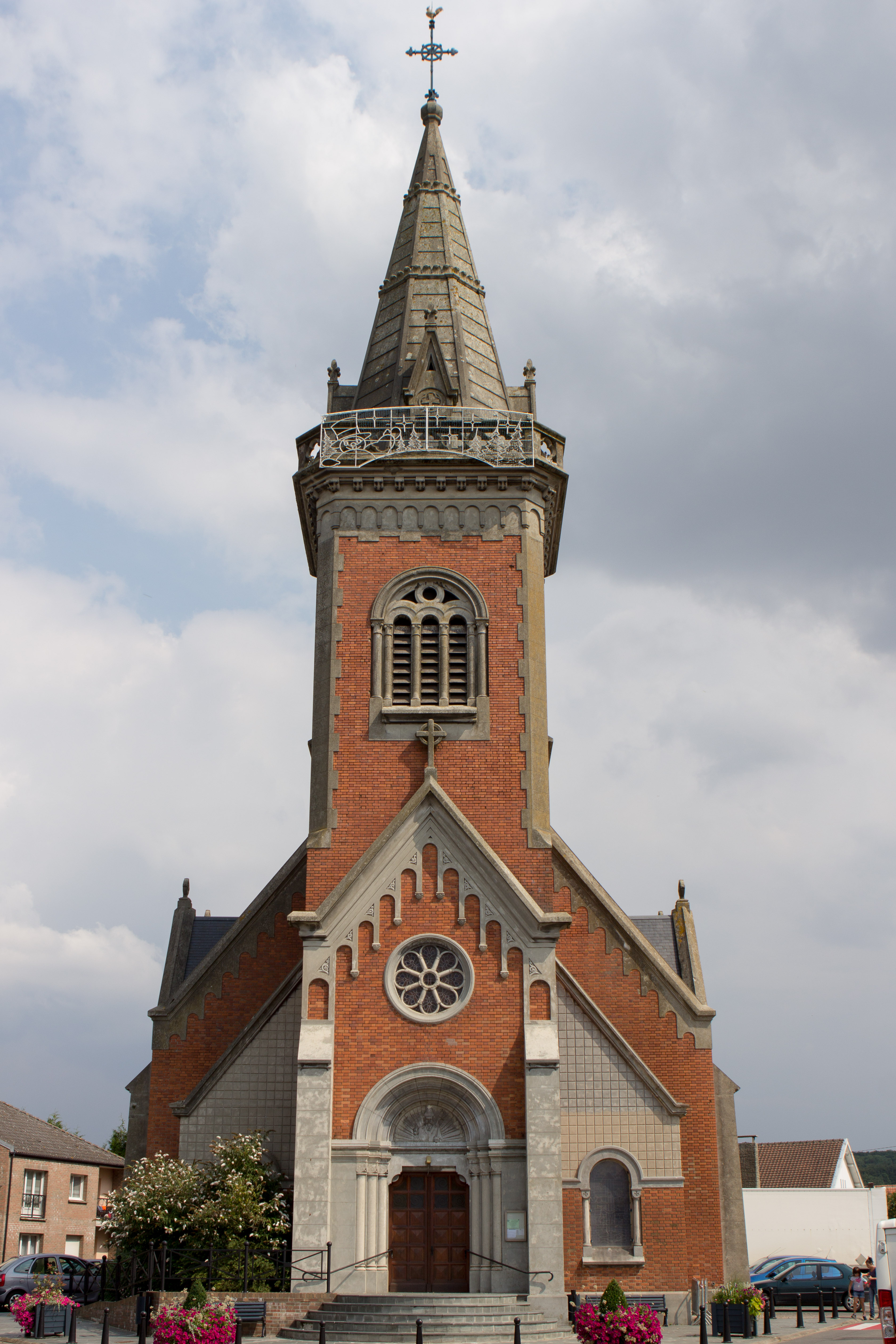 Église Saint-Nicolas de Souchez / Souchez / Pas-de-Calais / France